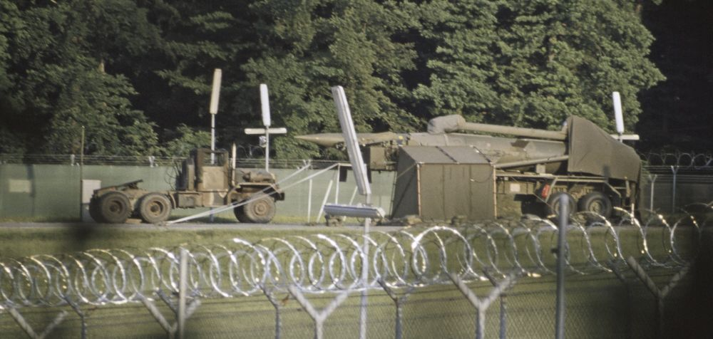 Der US-Militärstützpunkt auf der Heilbronner Waldheide im Mai 1982